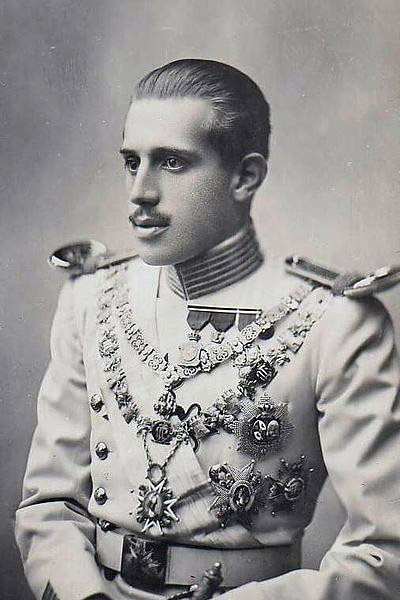 Jaime Enrique de Borbón, rey titular de Francia (1941-1975), el día de su boda con Emmanuella de Dampierre en Roma en 1935.